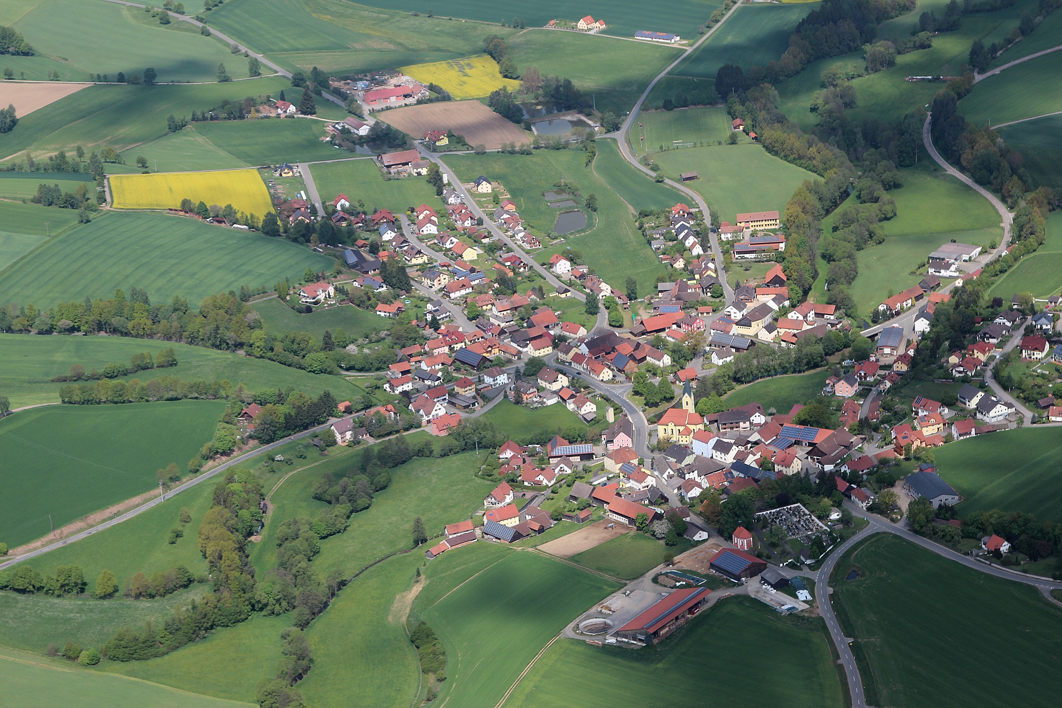 Niedermurach, Landkreis Schwandorf, Oberpfalz, Bayern